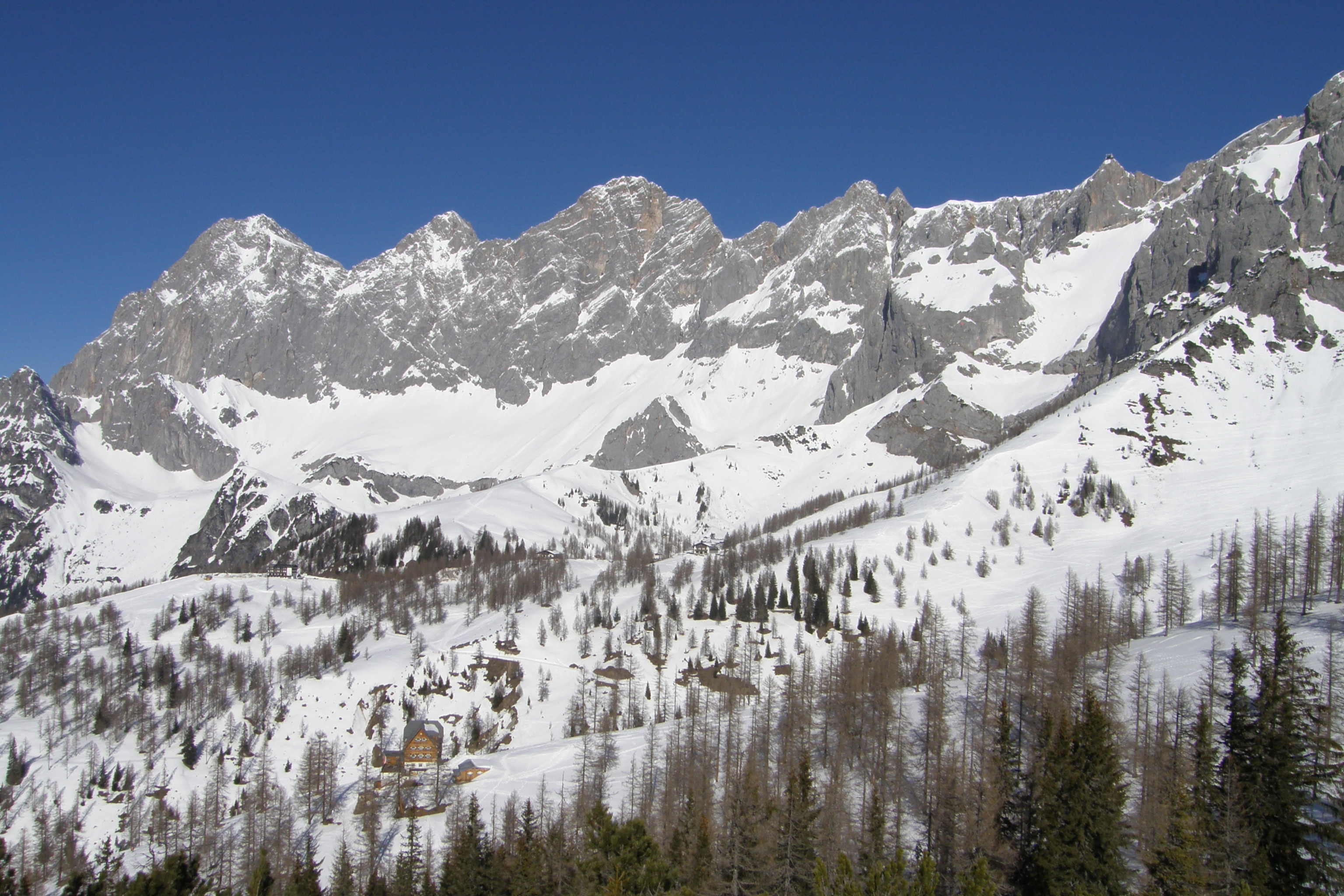 Dachstein 2995 m, südwand, ściana południowa